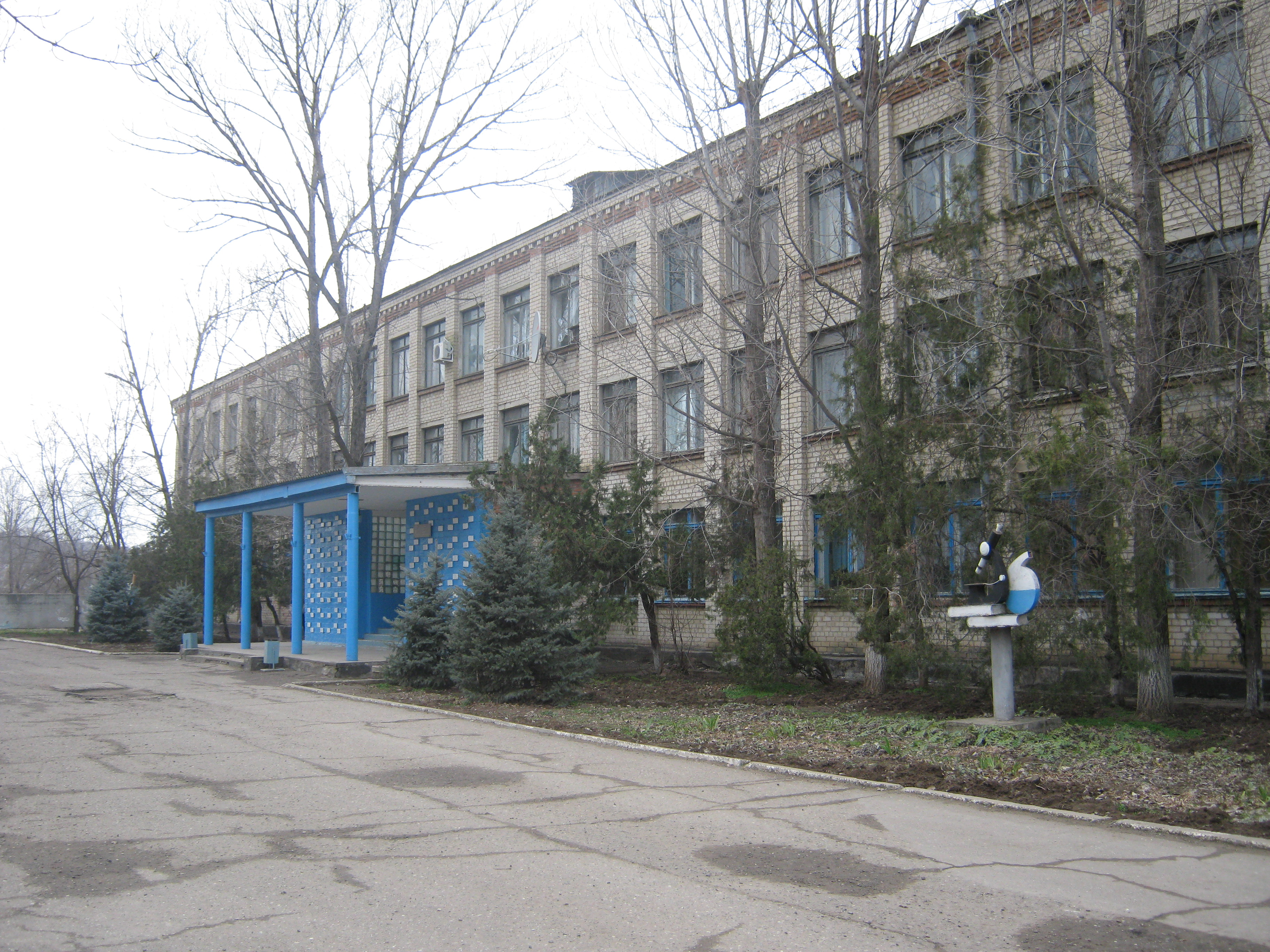 1 школа города Светлограда, построенна в 1966 году.